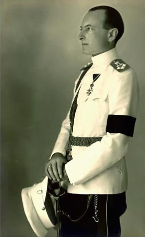 Српски (ћирилица): кнез Павле Карађорђевић